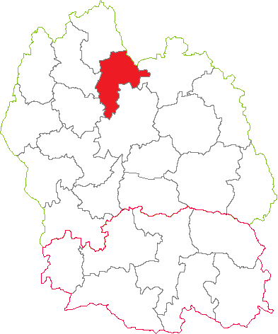 Situation du canton dans le département de la Lozère (France)